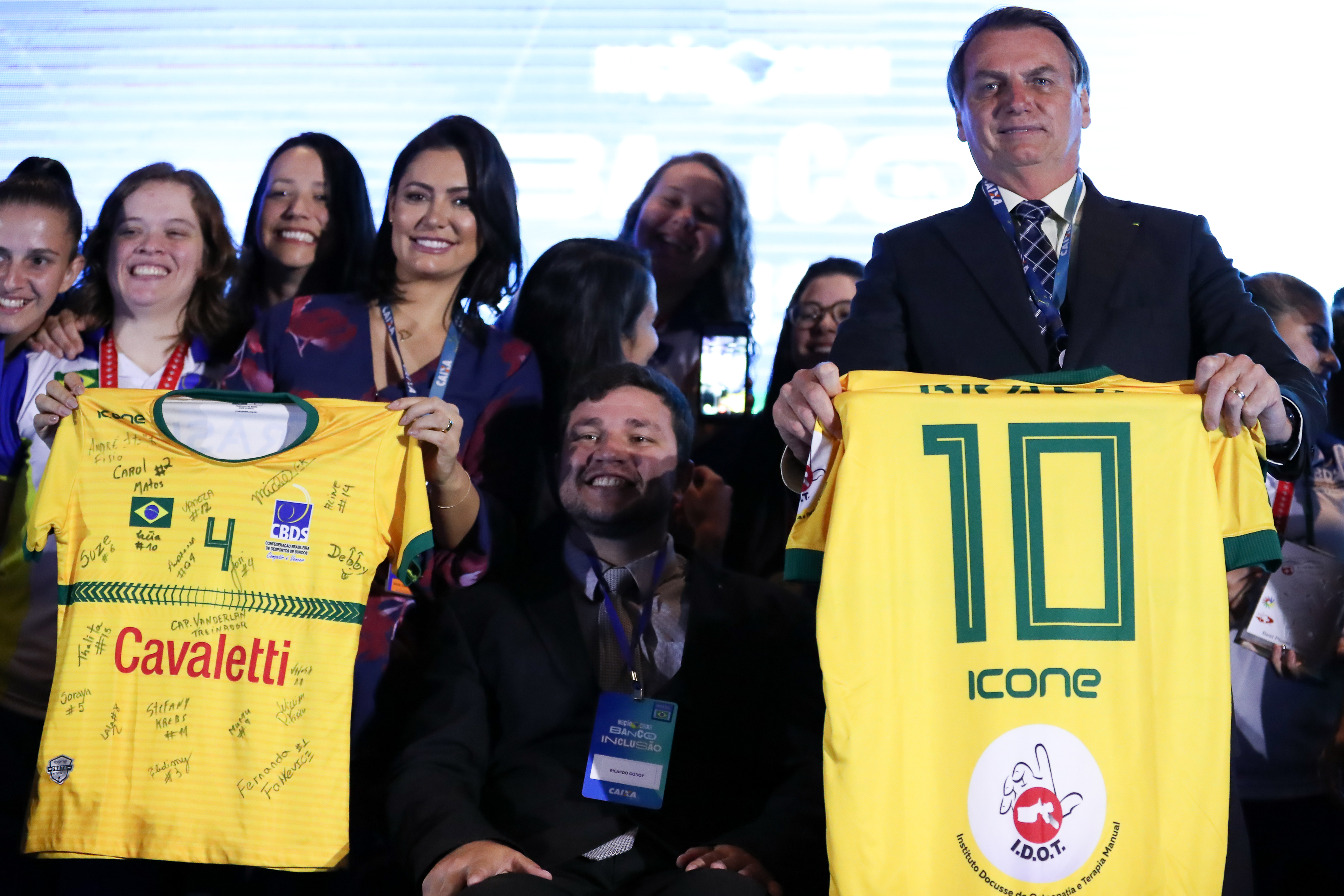 (Brasília - DF, 02/12/2019) Presidente da República, Jair Bolsonaro posa para foto com as Atletas da Seleção Brasileira de Futsal de Surdas.